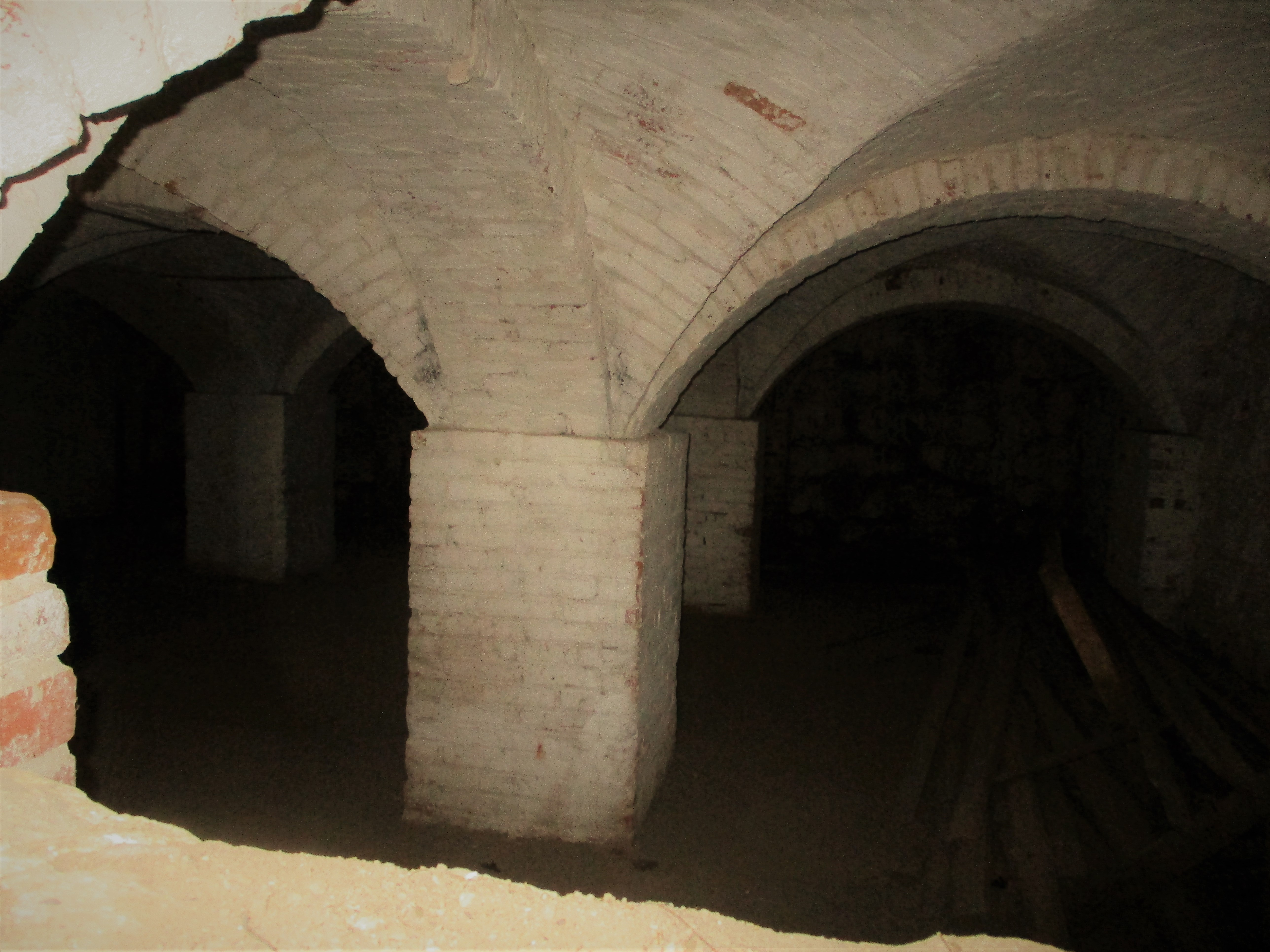 Tsooru linnuseala. Magasiaida võlvkelder, vaade lõuna suunas.